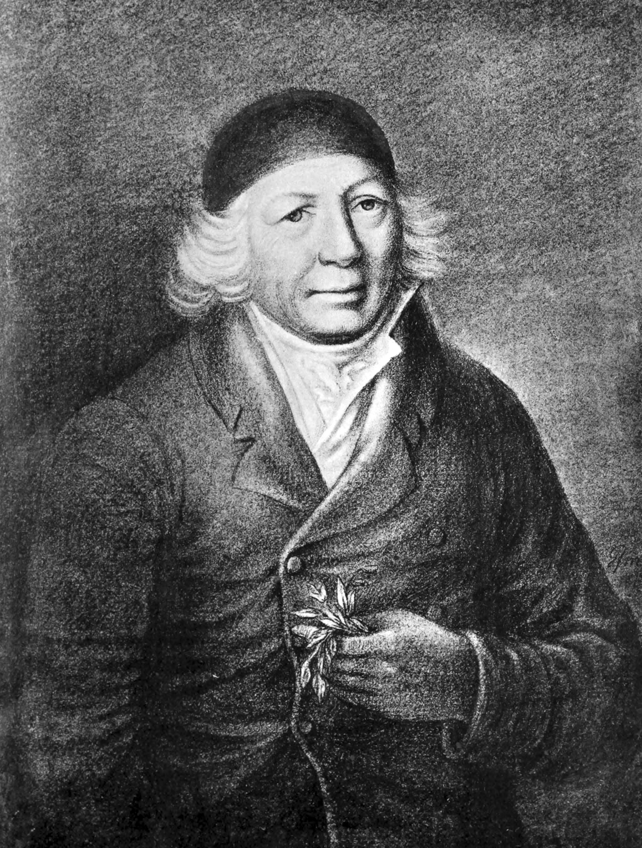 Birger Martin Hall (1741-1815)